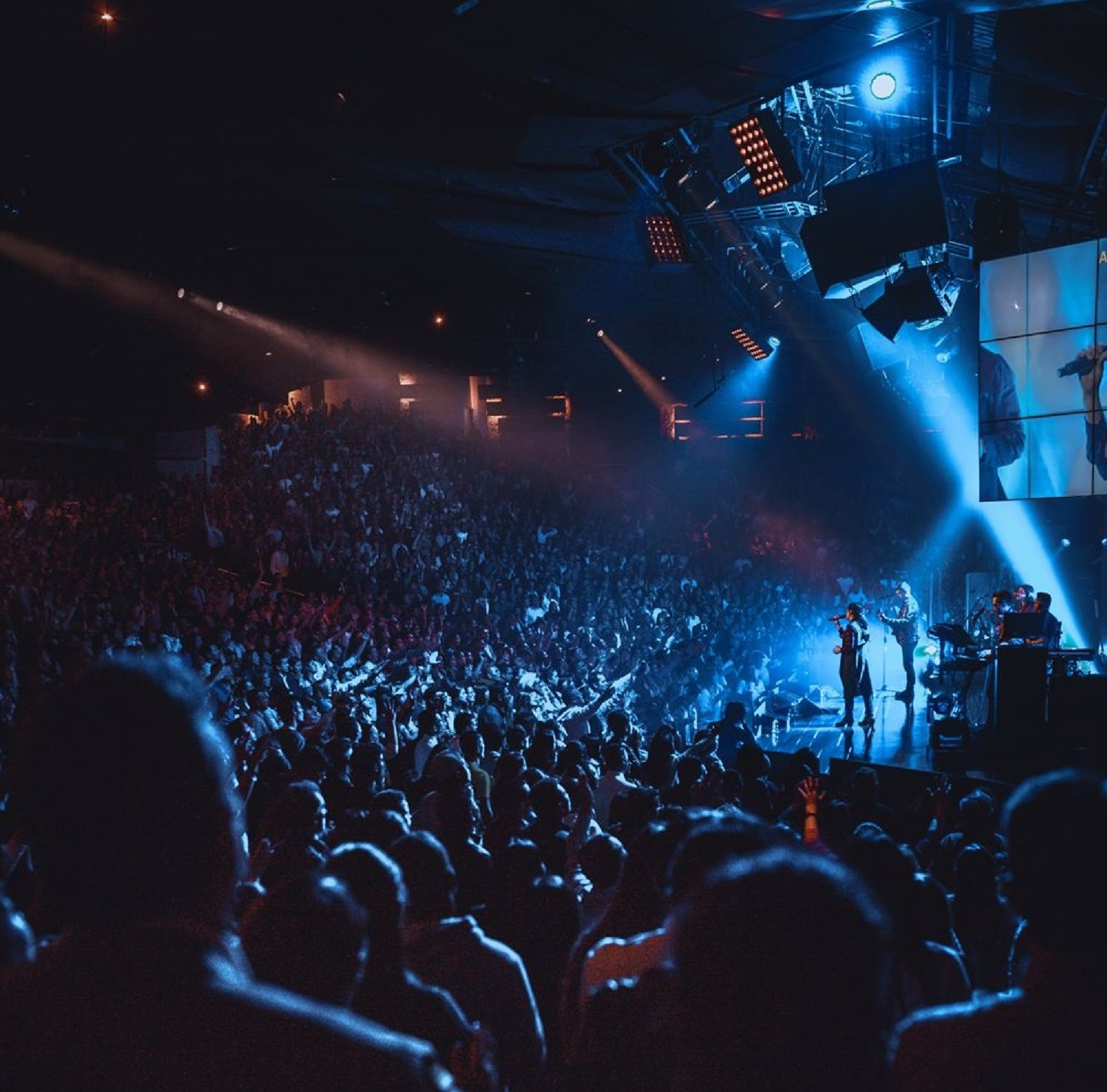 Culto en El Lugar de Su Presencia